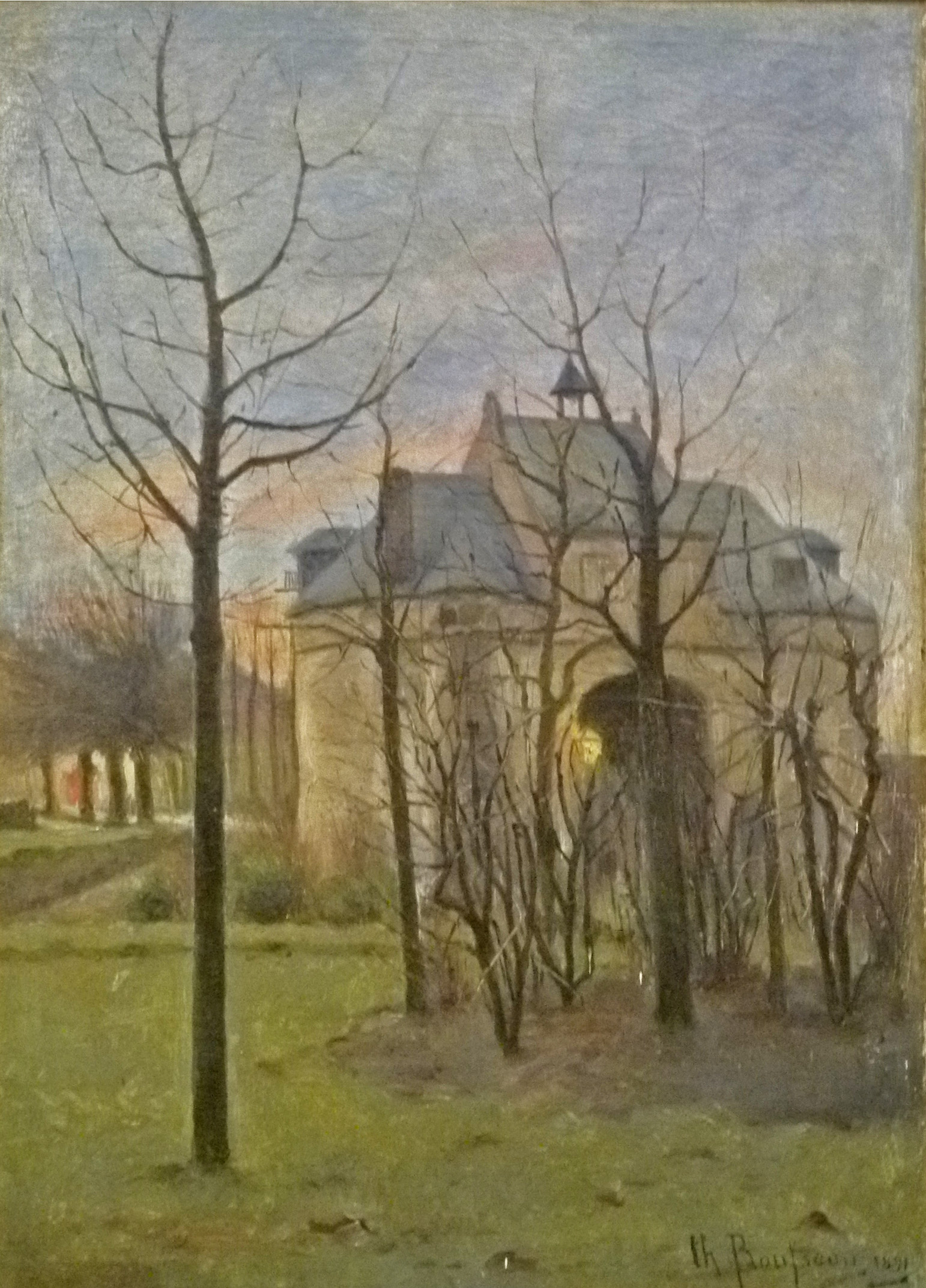 "Ezelpoort te Brugge", olieverf op doek (1891) (50 x 36 cm) door de Belgische kunstschilder Charles Rousseau (1862-1916)